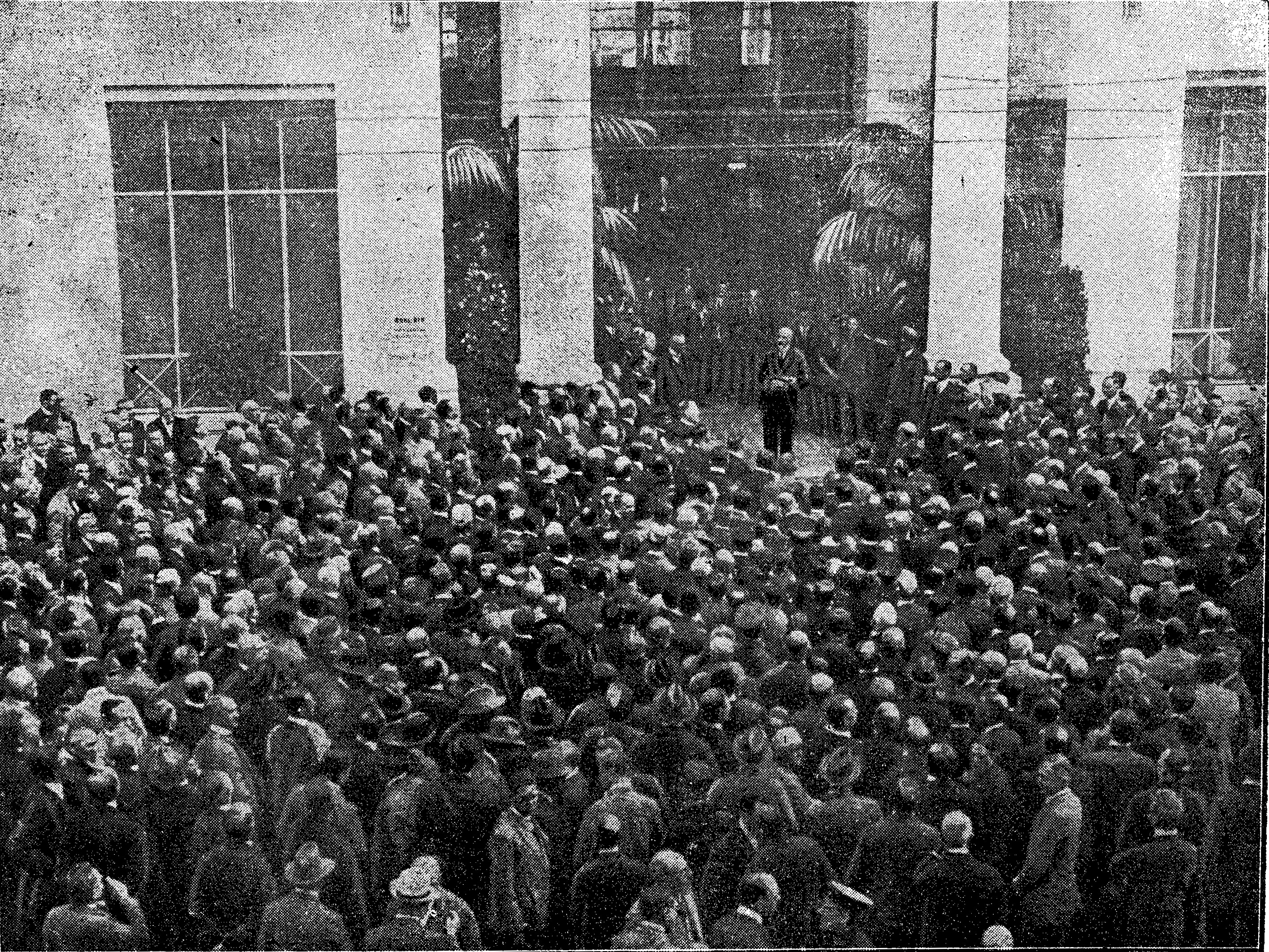 Berichterstattung zur Eröffnung der Wiener elektrischen Stadtbahn